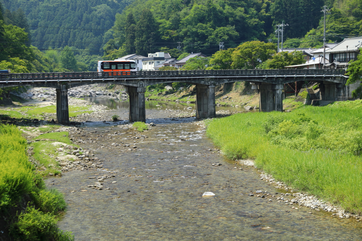 矢作川水系巴川と国道420号巴橋（豊田市足助町、2019年（令和元年）6月）